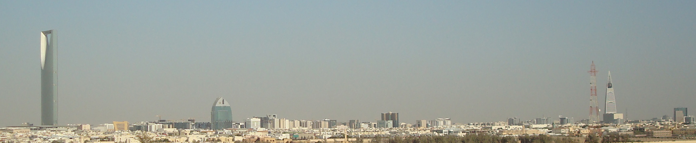 റിയാദിലെ ഉയരം കൂടിയ ടവറുകൾ